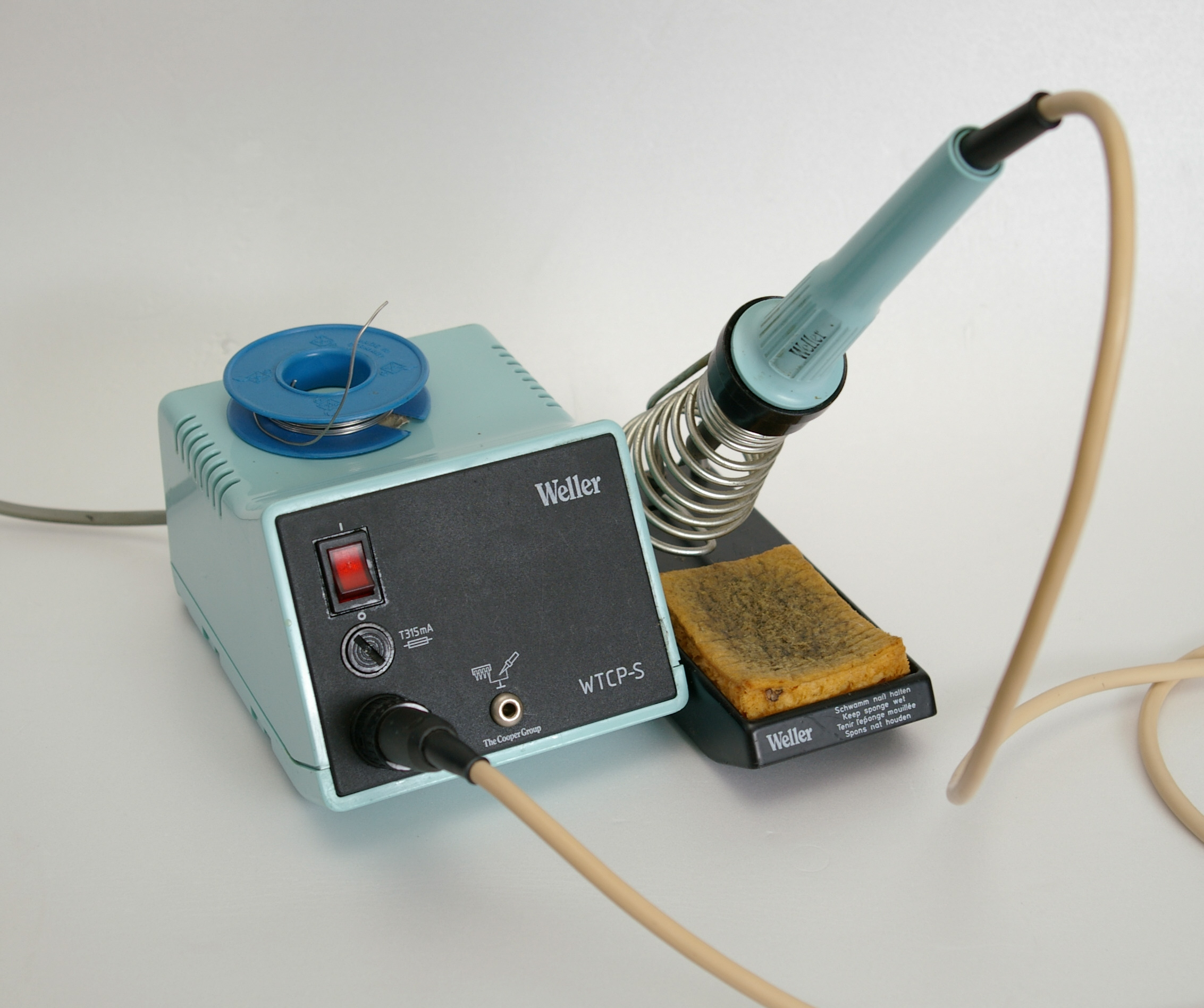 Lötstation Weller WTCP-S, 50 Watt. Temperaturregelung über Magnastat™-System durch Auswechseln der Lötspitzen.